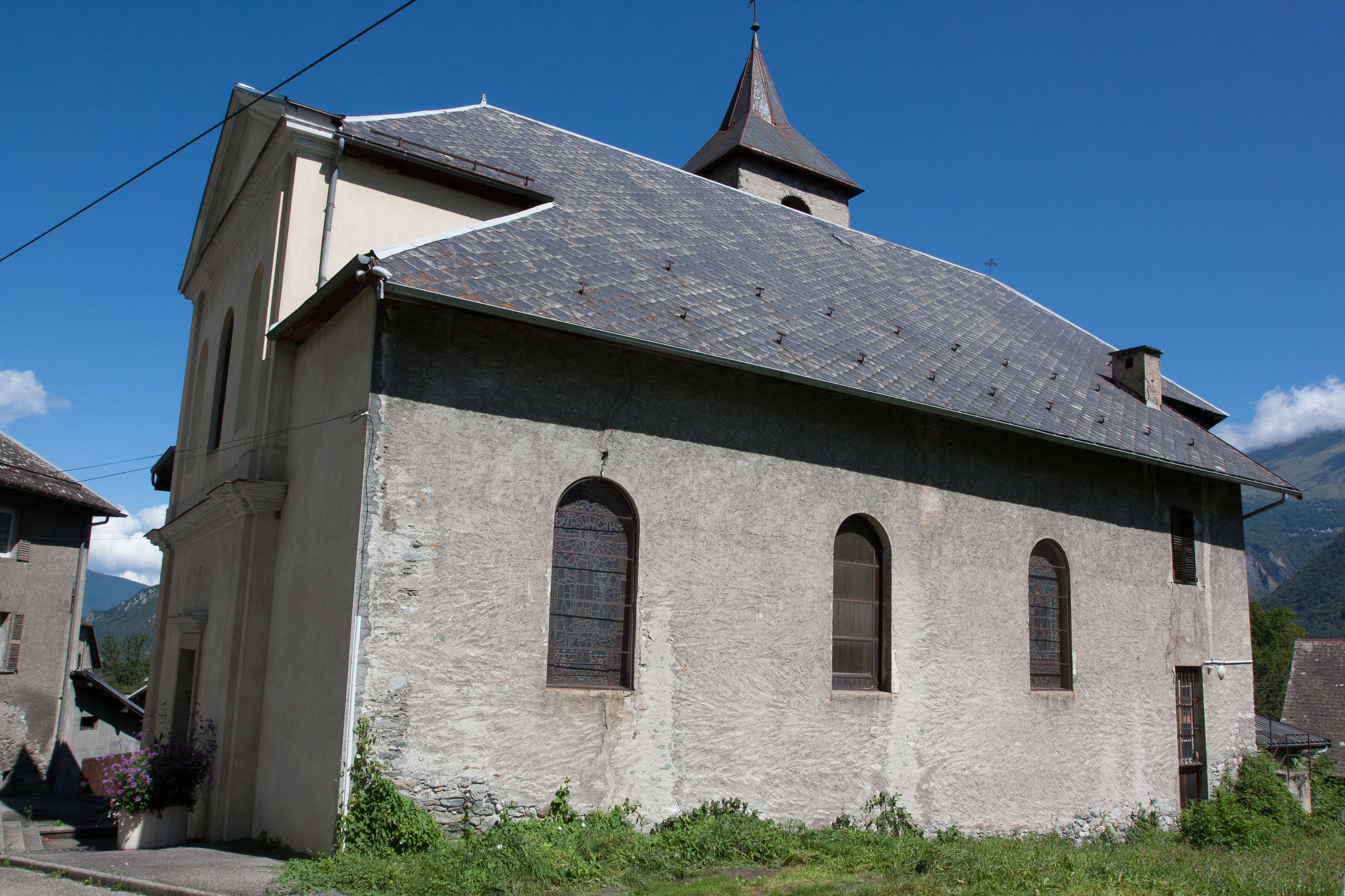 Église de Saint-Étienne-de-Cuines / Saint-Étienne-de-Cuines / Savoie / France